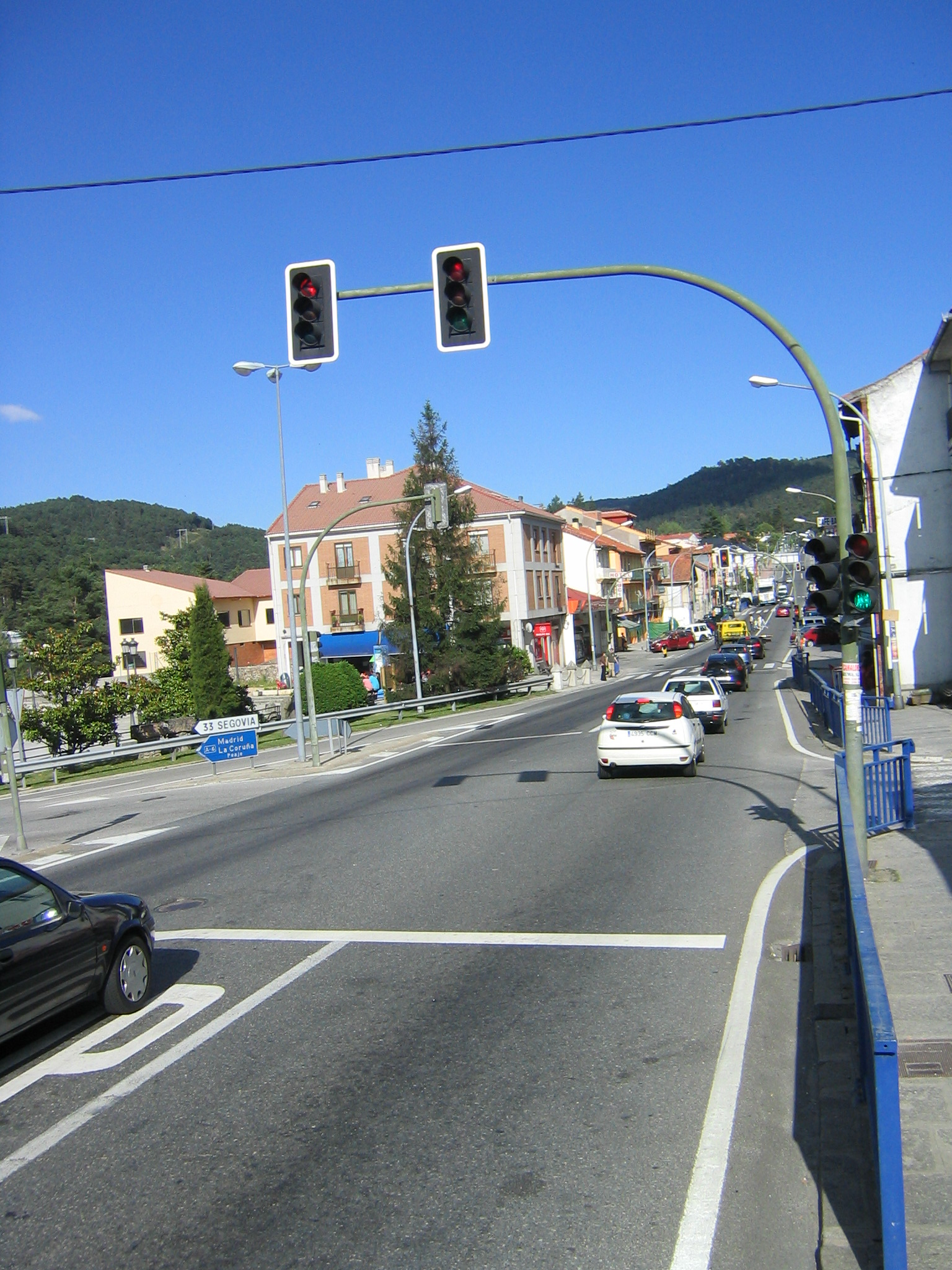 El Espinar, Segovia España. Avda. Alto del León.